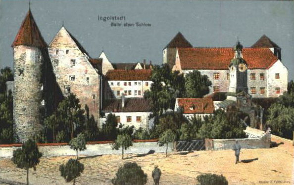 Ingolstadt, Beim alten Schloss